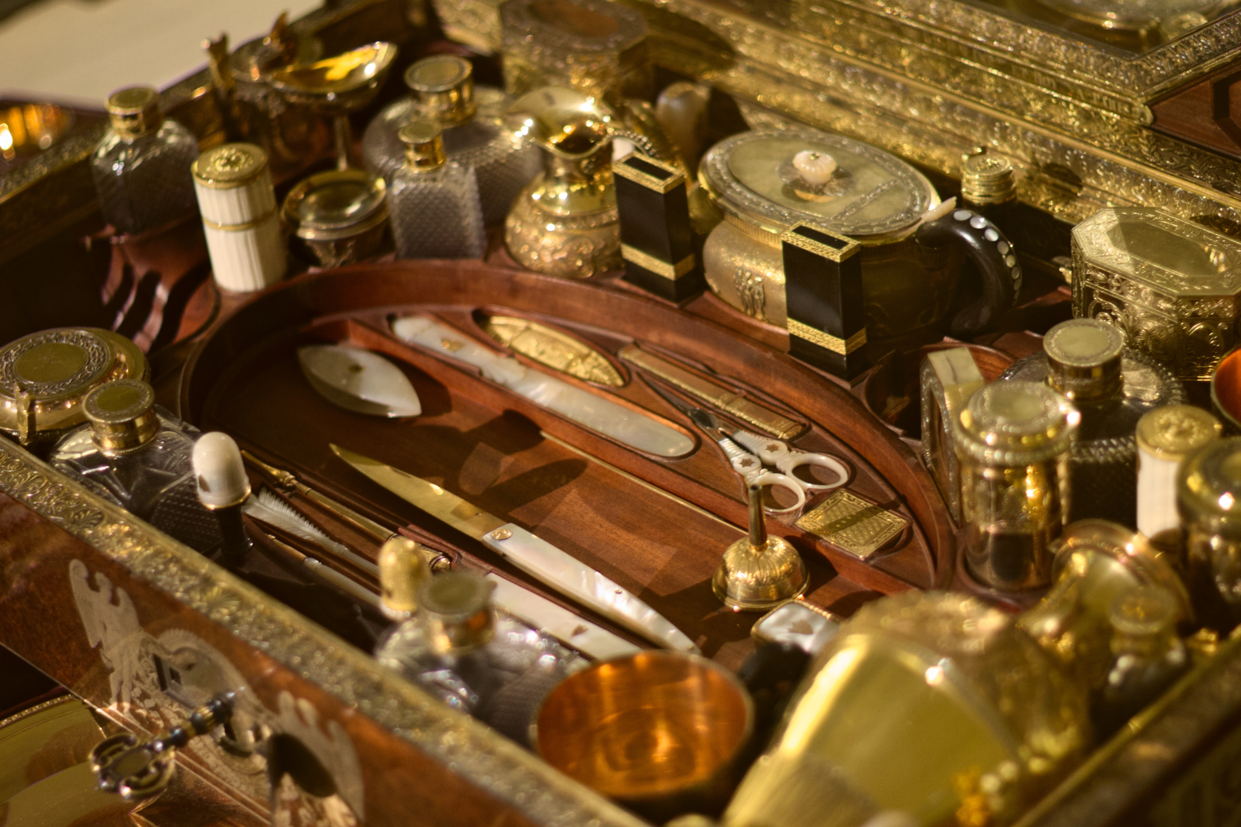 Nécessaire de voyage de l'impératrice Marie-Louise d'Autriche, offert par Napoléon Ier. Réalisé à Paris en 1810.